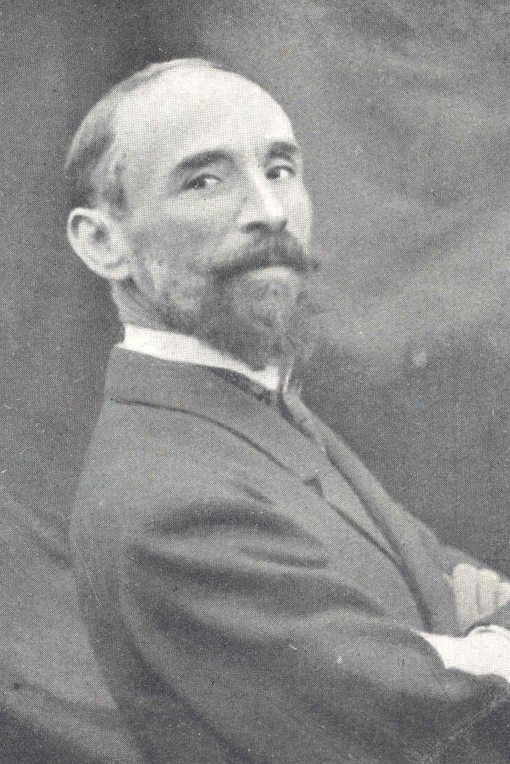 autore sconosciuto, da L'Illustrazione italiana 1900, ritratto di Francesco Paolo Michetti, opera il cui autore è morto da più di 70 anni, acquisita da scanner